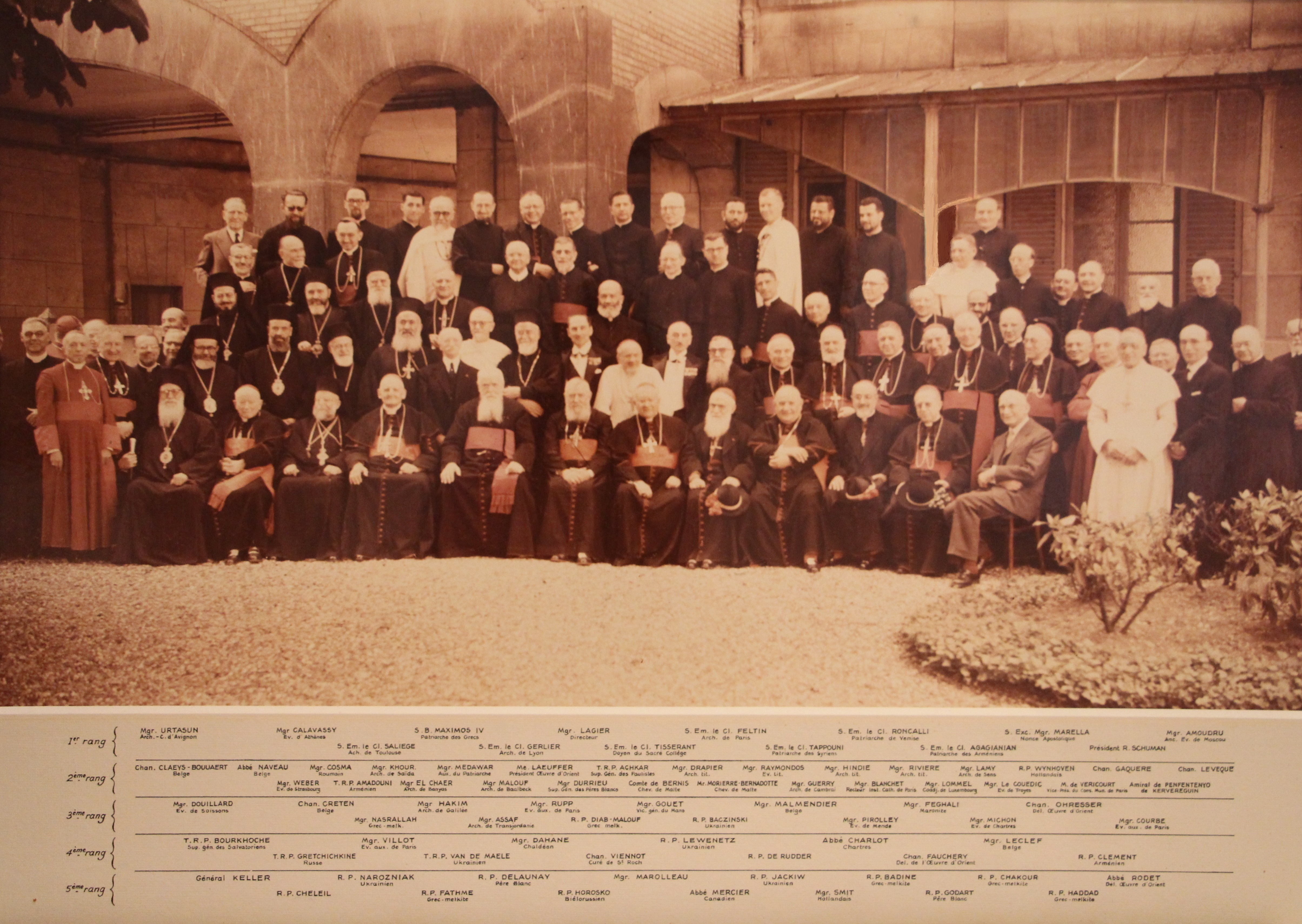 Photo d'une Photographie réalisée à l’Occasion du Centenaire de L’Œuvre d’Orient en 1956, accrochée dans les Bureaux de L’Œuvre d’Orient à Paris. On reconnait parmi les personnalités le Cardinal Roncalli, future Pape Jean XXIII, en sa qualité de Patriarche de Venise